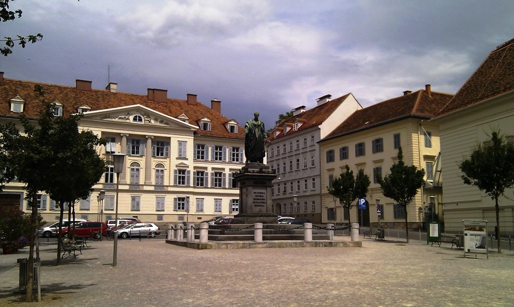 Grazer Freiheitsplatz, Reste der mittelalterlichen Stadtmauer der landesfürstlichen Burg?